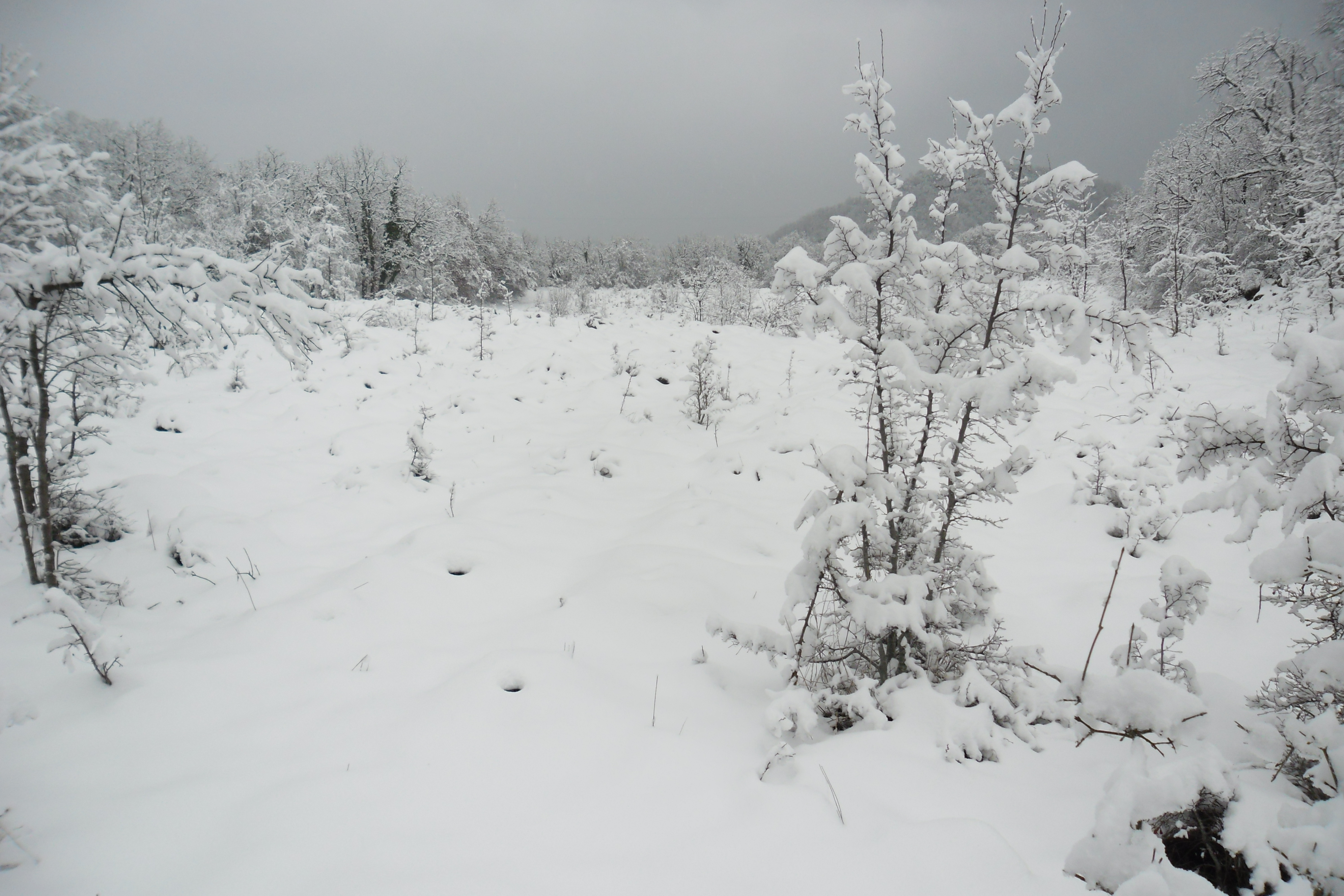 Фото